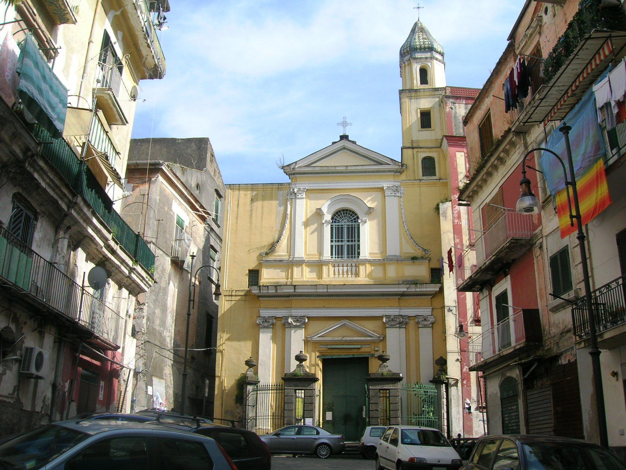 La facciata delle chiesa di San Bartolomeo a Castellammare di Stabia